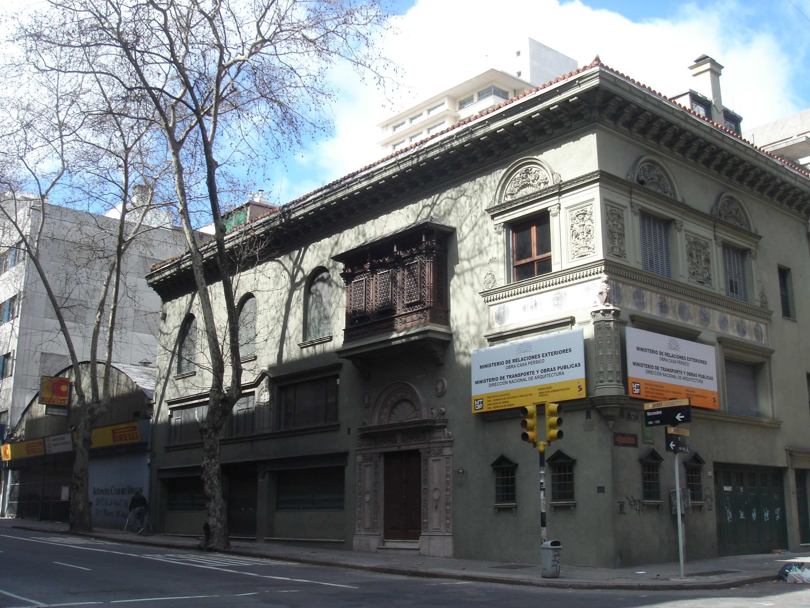 Casa de don Augusto Pérsico. Esta hermosa construcción fue diseñada por el arquitecto Julio Vilamajó en 1926, por encargo de Augusto Pérsico. Con distinguido estilo ecléctico, en el cual se ve la influencia que recibiera su arquitecto de su viaje a Europa entre los años 1921 y 1924, de los estilos arquitectónicos morisco y español.